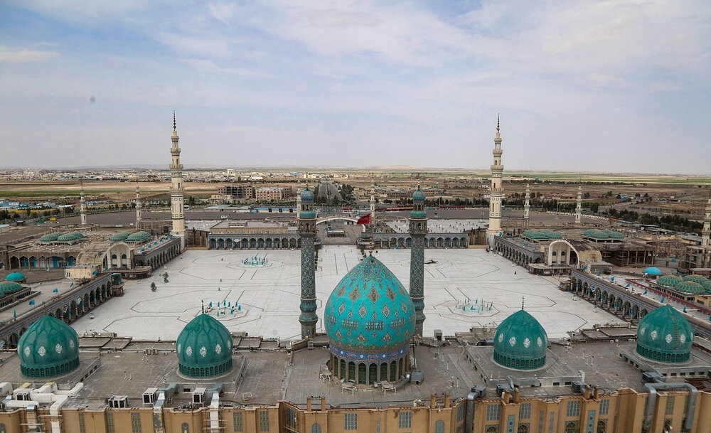 تصاویر هوایی شهر قم در روز طبیعت